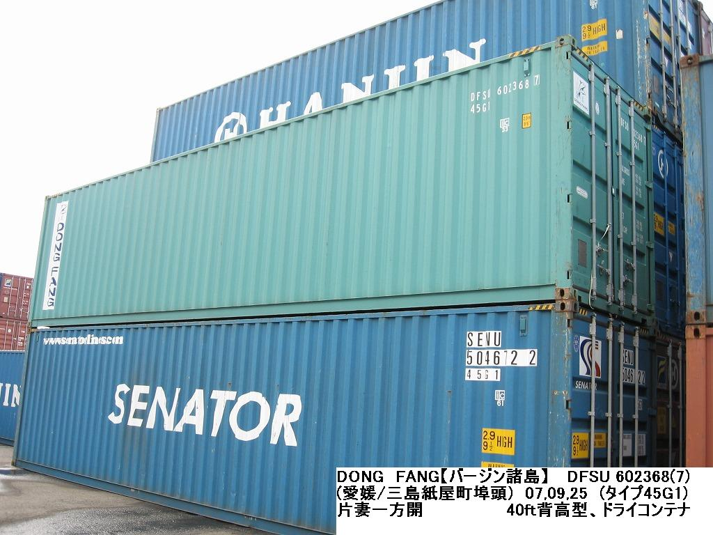 関連資料画像。 詳しくは焼付け解説を参照下さい。